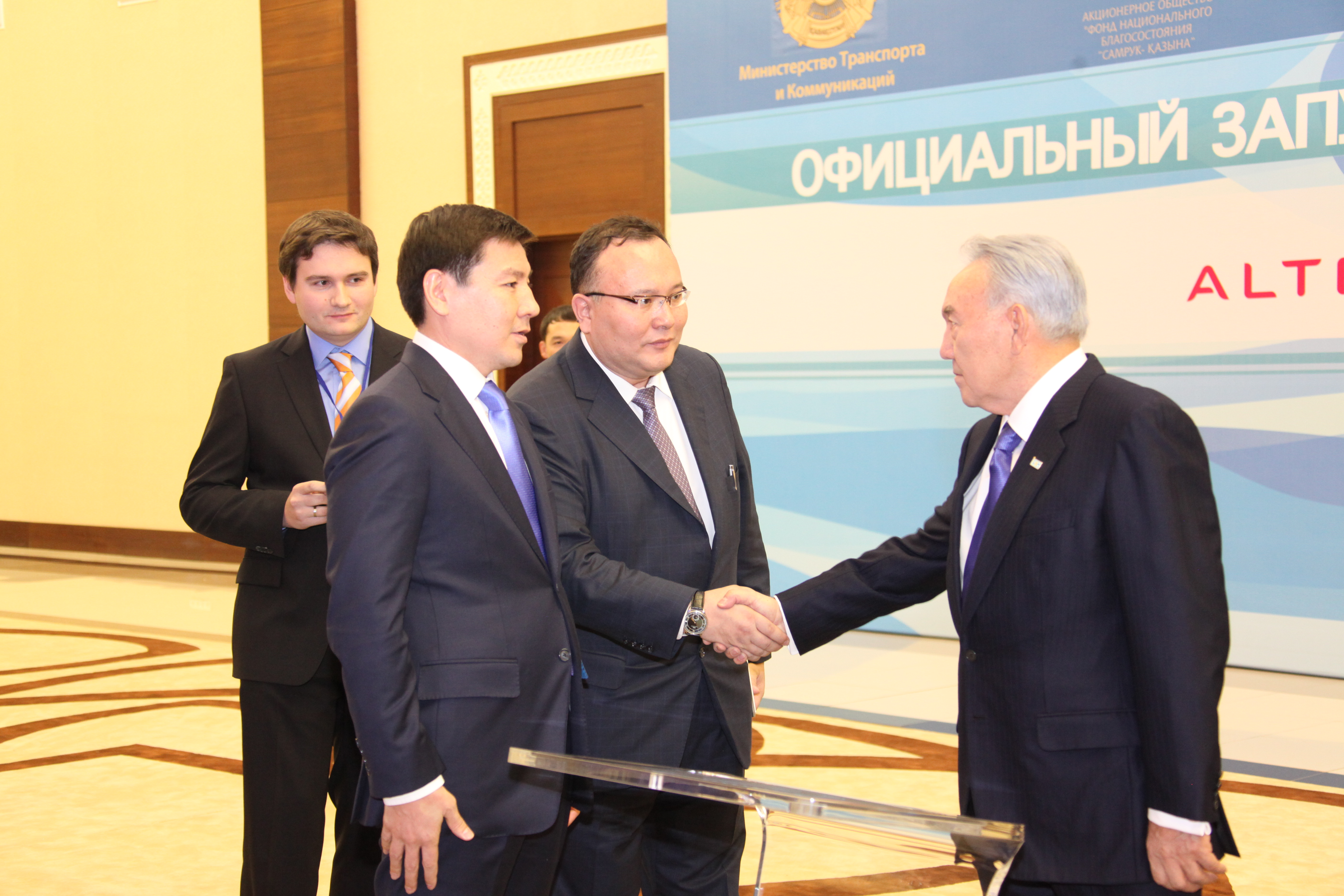 Н.А.Назарбаев запускает 4G